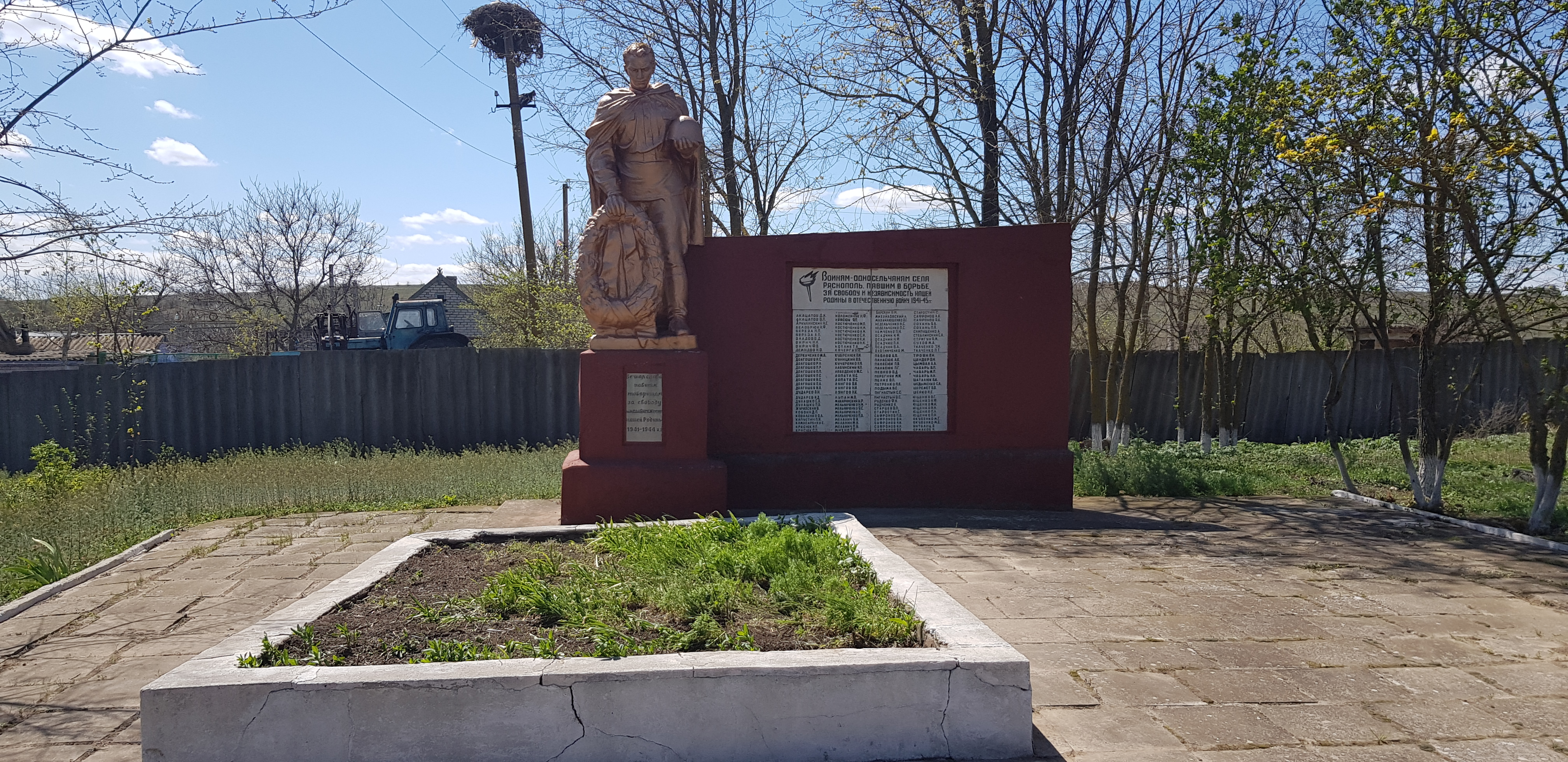 Братская могила в селе Ряснополь